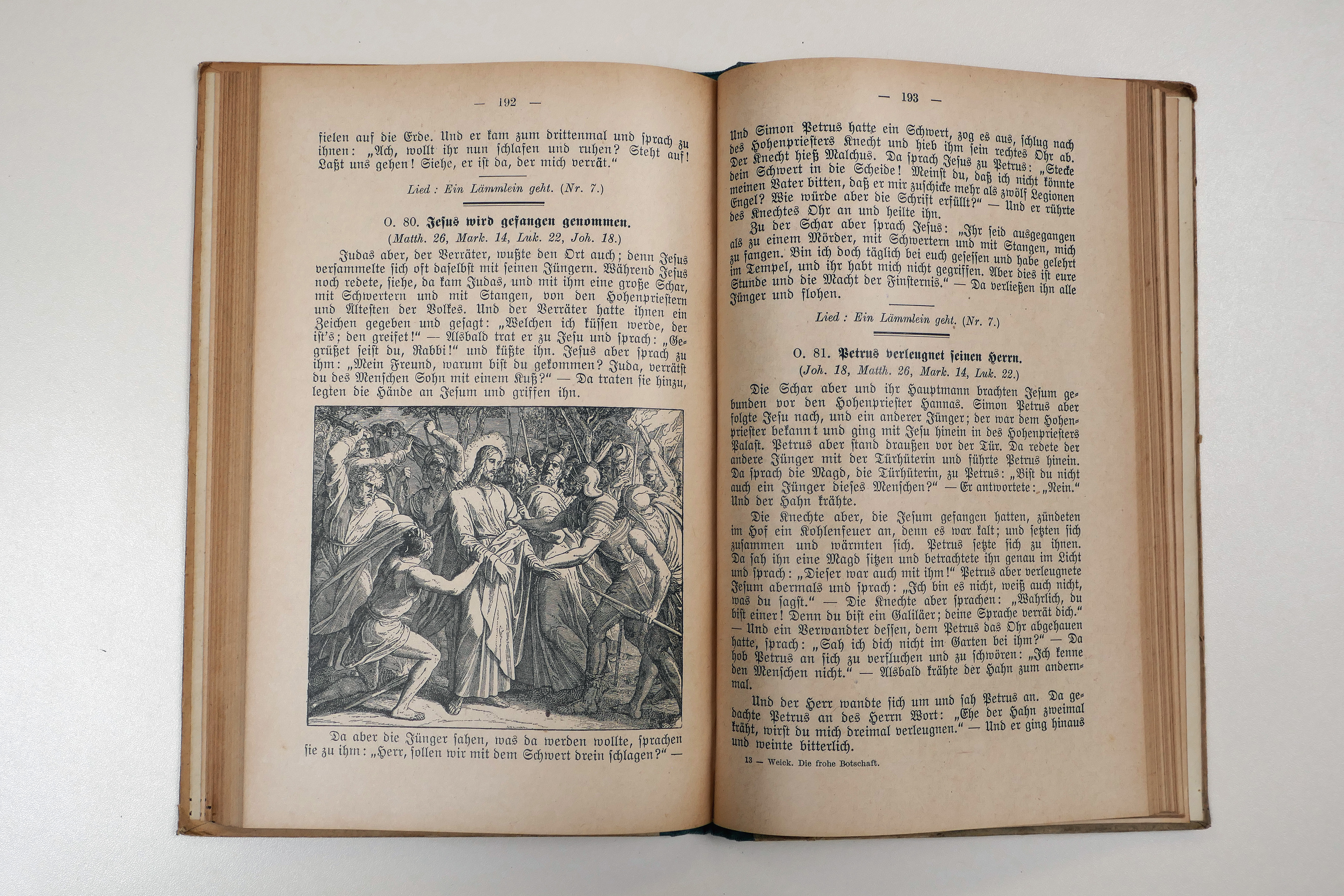 Die frohe Botschaft : Biblische Geschichte, der kleine Katechismus Luthers, zwei und funfzig Lieder und Psalmen : für Volks, Mittel- und die untern Klassen höherer Schulen Georg Weick Illustrations de Julius Schnorr von Carolsfeld (1794-1872). Strasbourg : Strassburger Druckerei & Verlagsanstallt s. d., 7e éd. (1ère éd. : fin du 19e s. ? début du 20e s. ?) Médiathèque protestante de Strasbourg. Cote : A Vb 0413